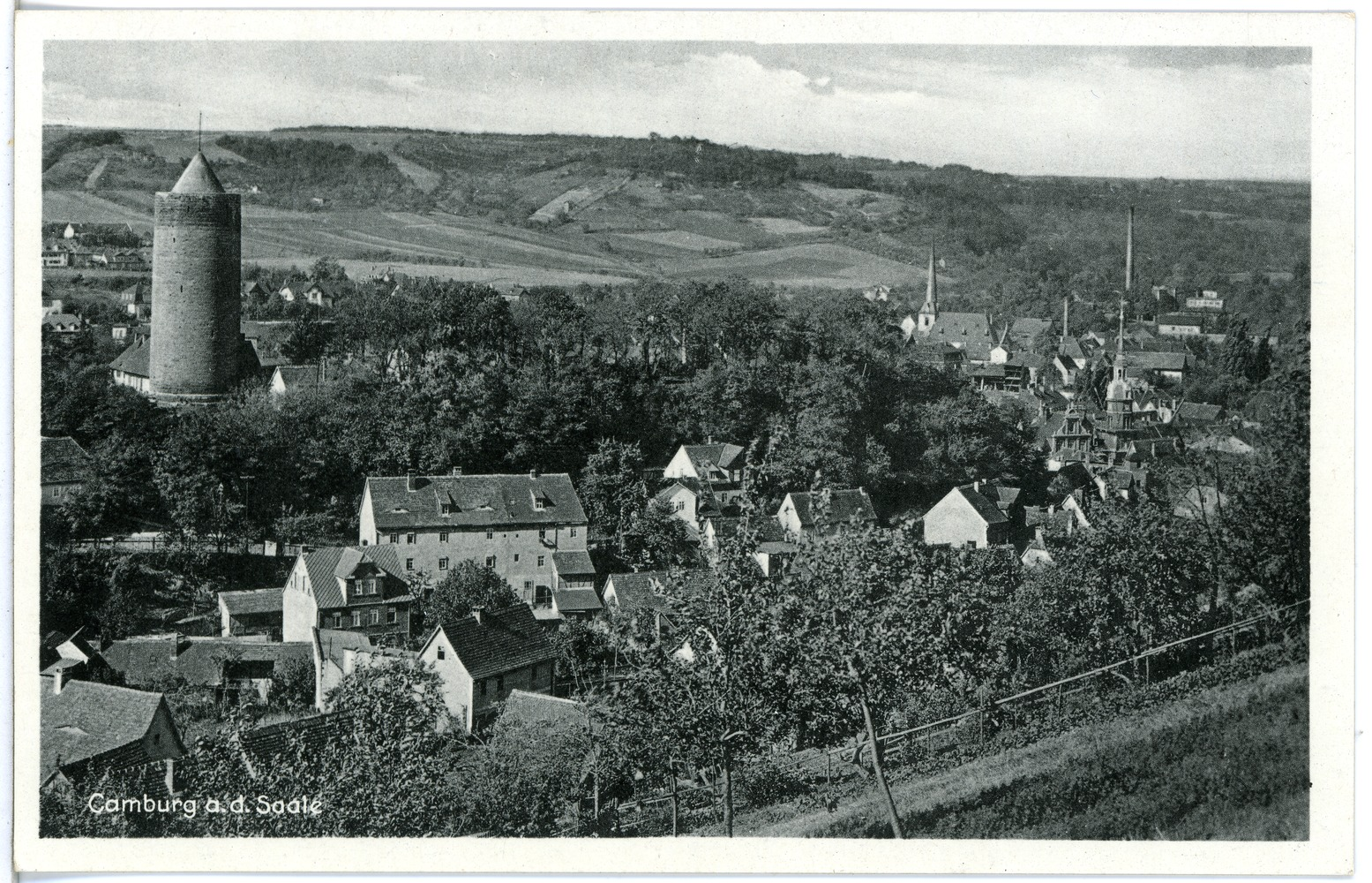 Camburg; Blick auf Camburg This postcard is from publisher Brück & Sohn in Meißen ( postcard has a unique number 26213 and is available in a higher resolution at the publisher. This images was uploaded in a cooperation project between Wikipedians and the publisher.